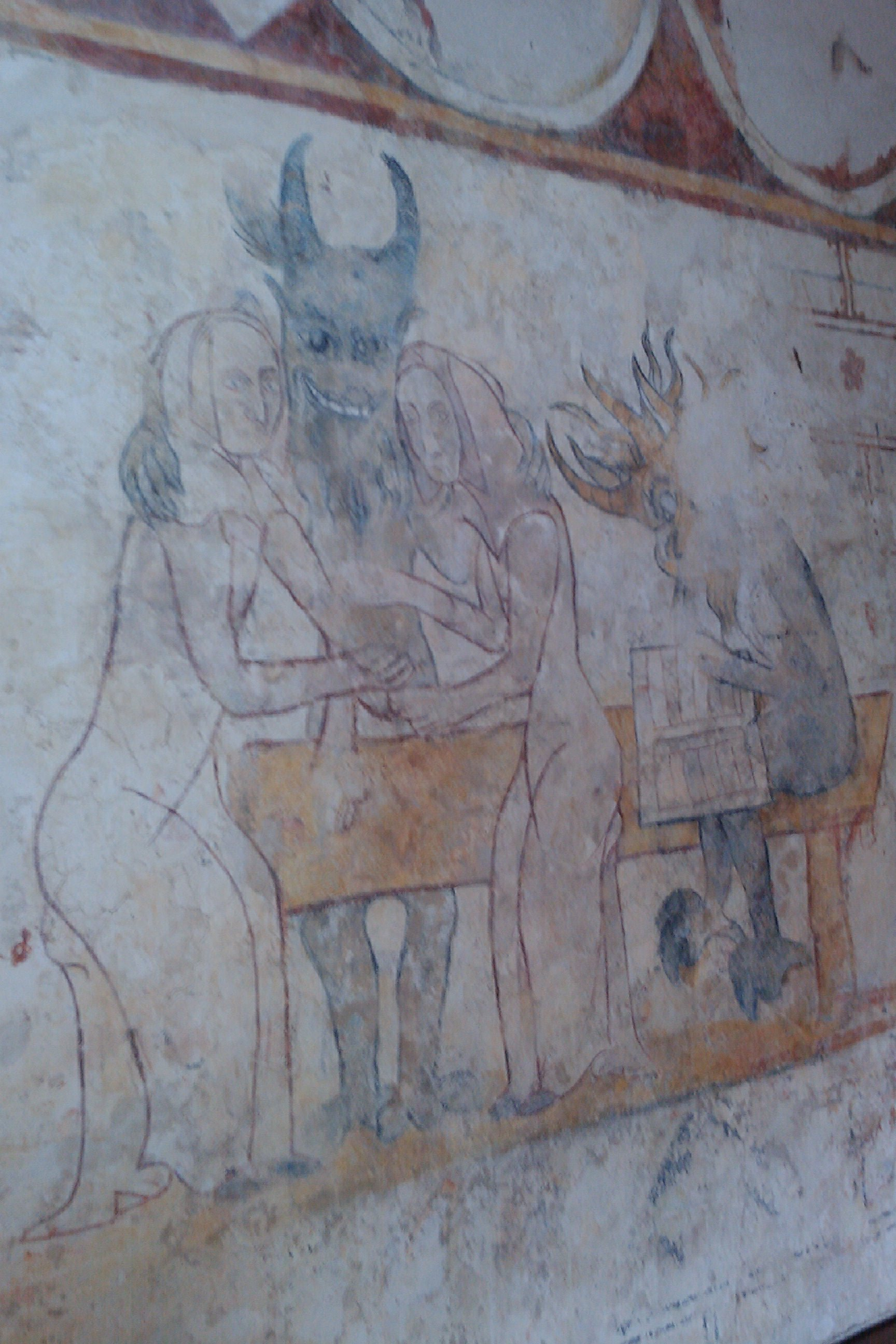 Église Saint-Pierre du Mesnil-Aubert église du XIIIe siècle, en grande partie romane avec de remarquables peintures murales .